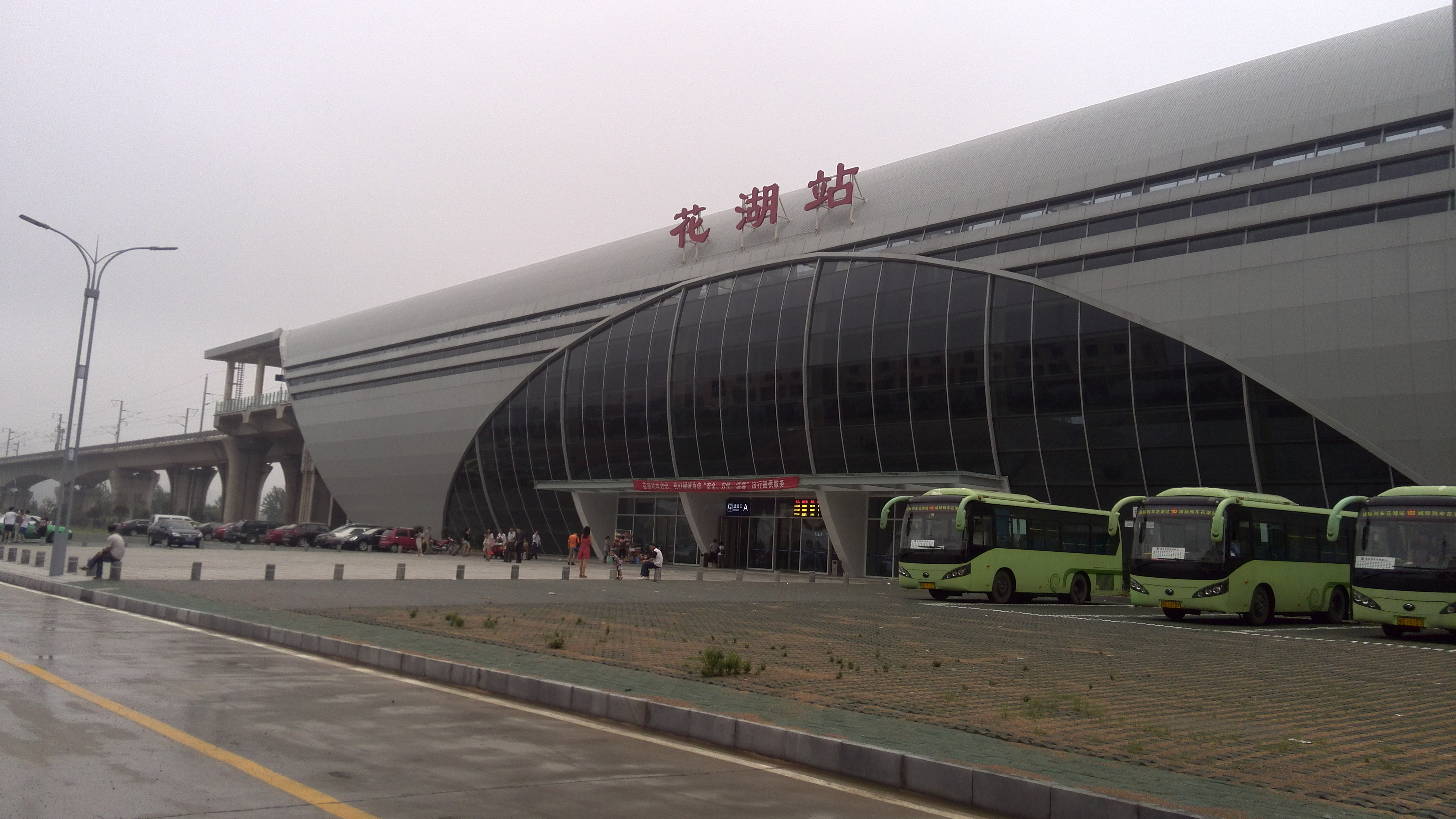 湖北省鄂州市鄂城区 花湖火车站